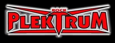 Oficiální logo chebské hudební skupiny Plektrum.